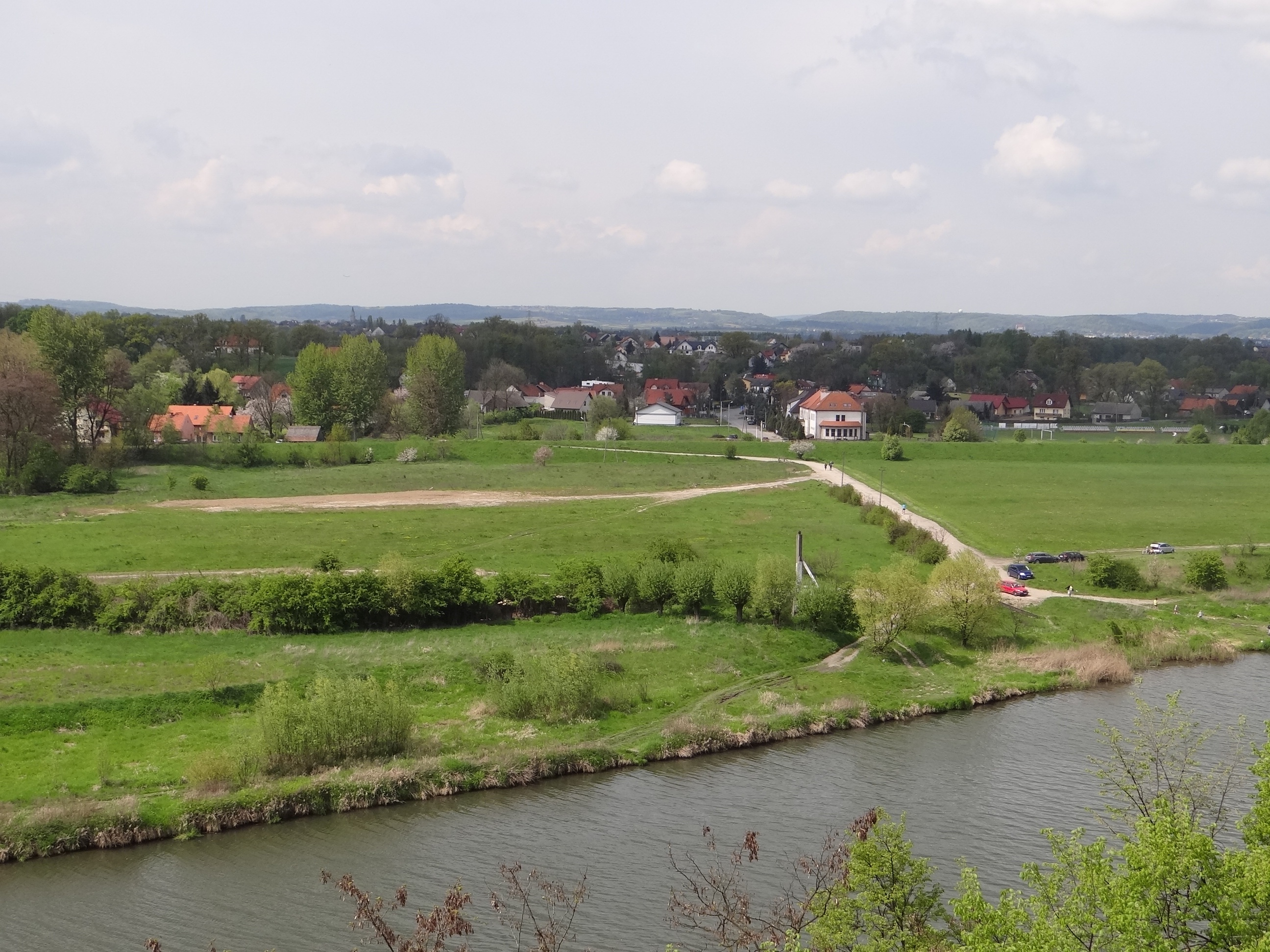 Piekary, Widok z Tyńca